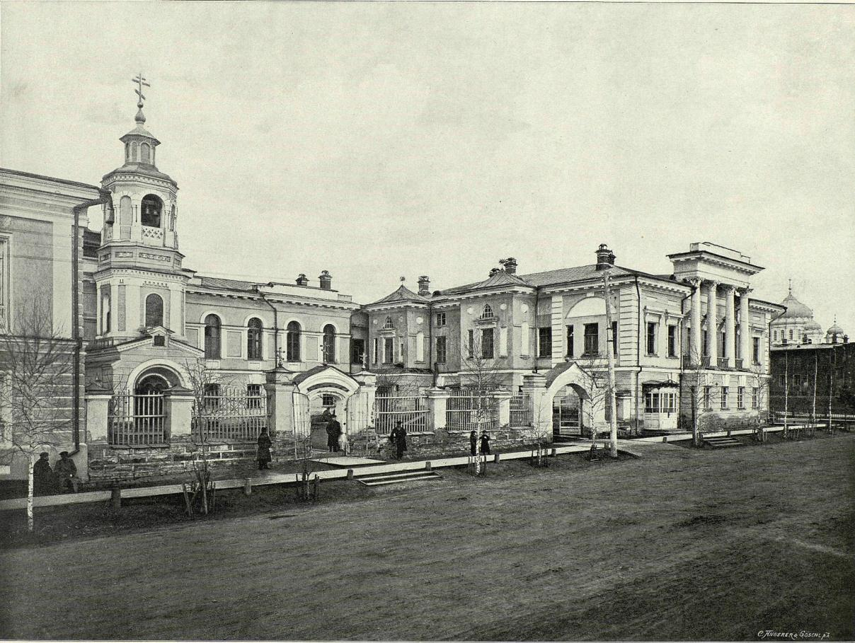 Томск. Архиерейская домовая церковь